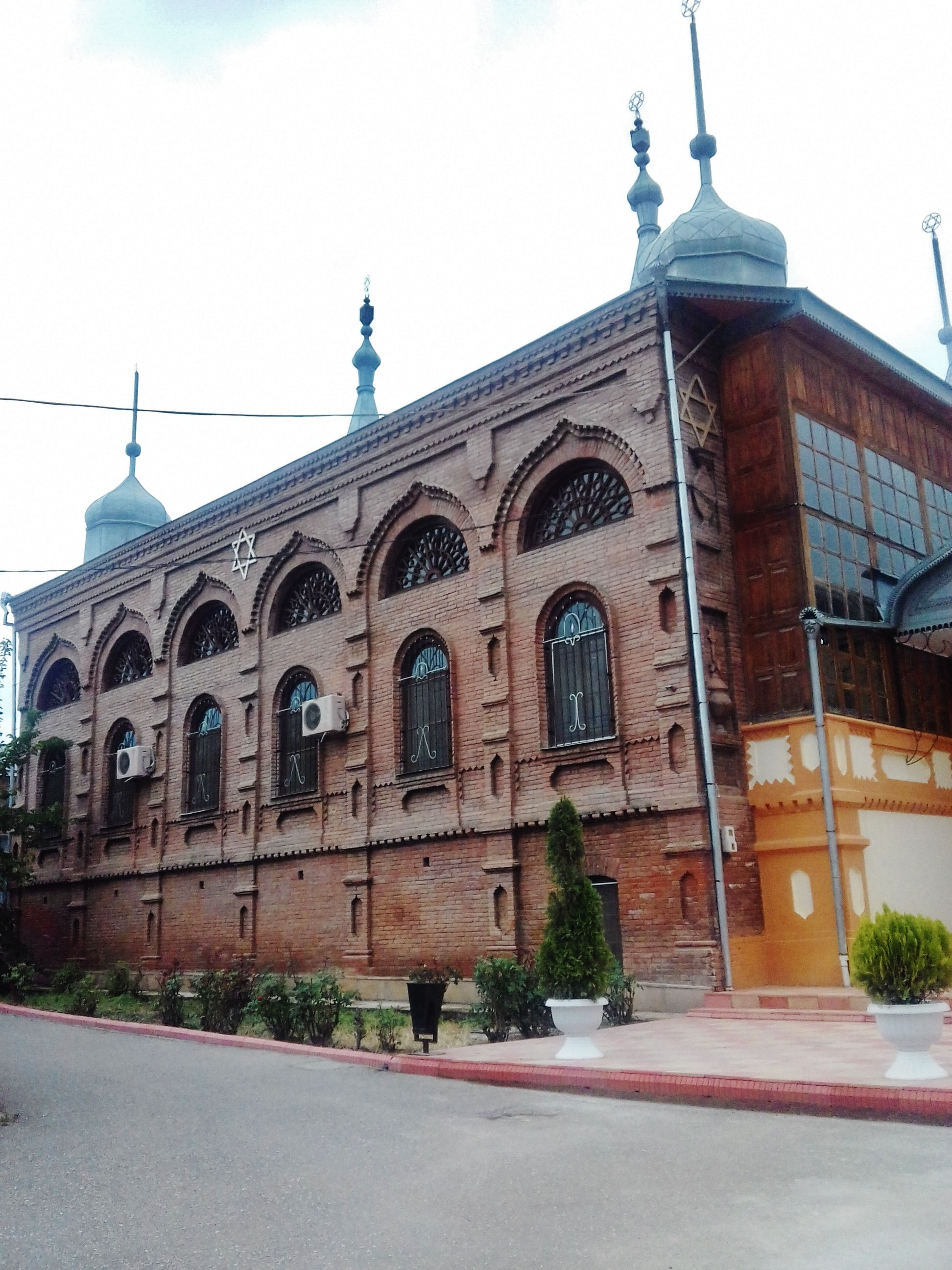 Qırmızı qəsəbə.Altı günbəz sinaqoqu